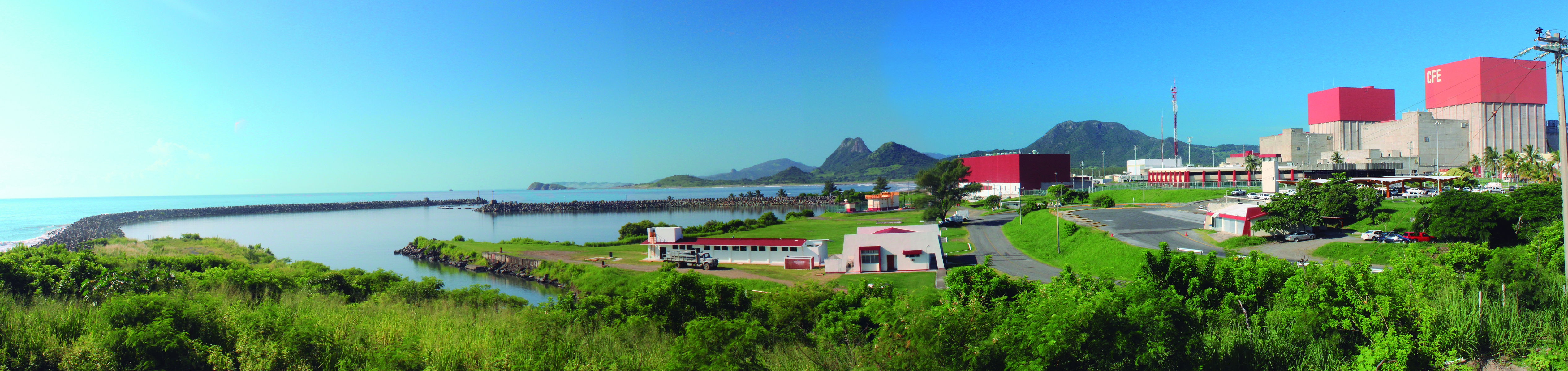 Panoramica de la única Central Nuclear en México